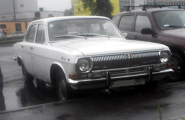 ГАЗ-24 второй серии (поздний выпуск)